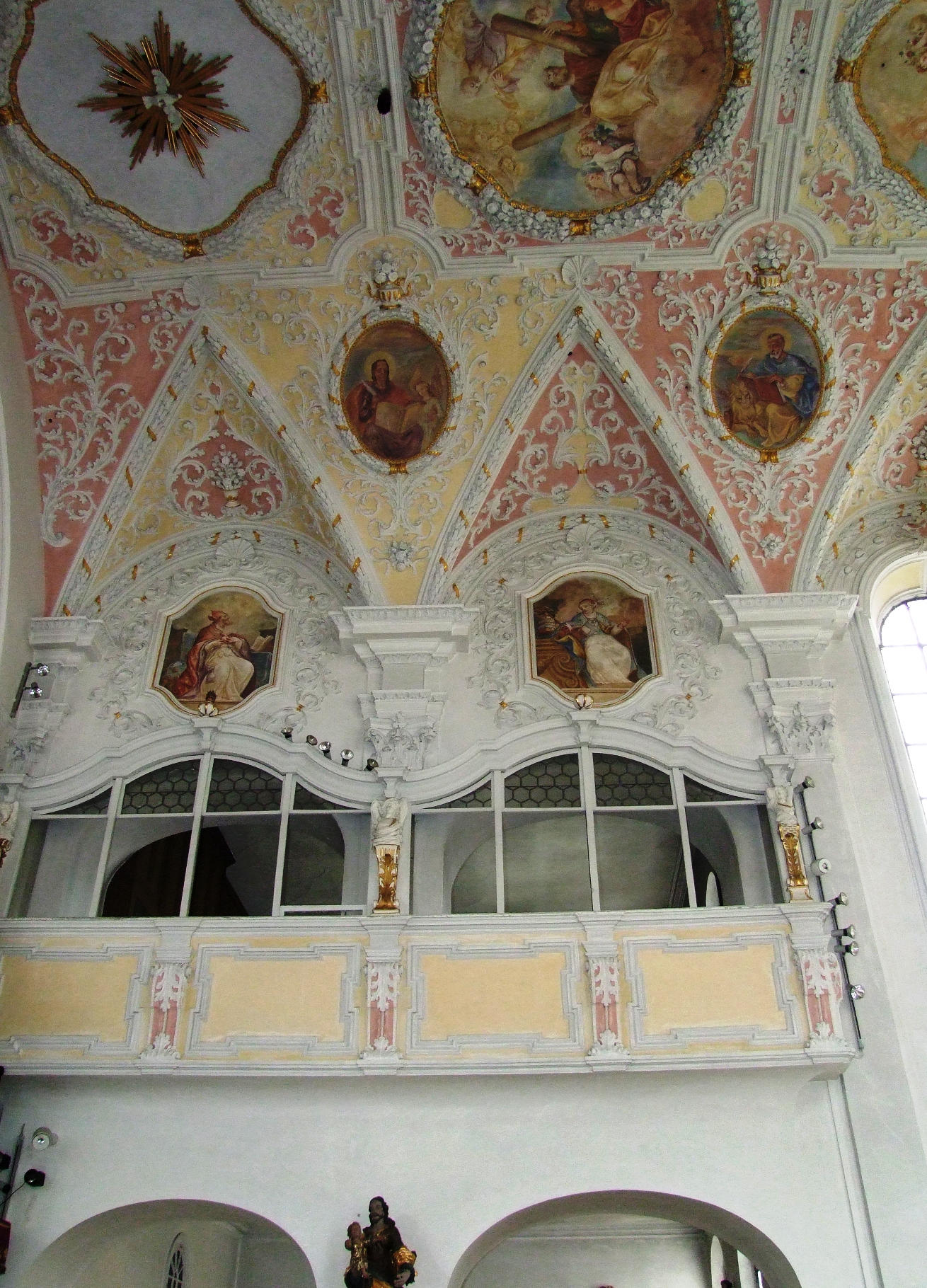 St. Andreas in Babenhausen bei Memmingen Blick auf die nördliche Chorkapellenempore mit Matthäus und Markus (Ovalbilder) und Augustinus und Gregor dem Großen (an der Seitenwand)